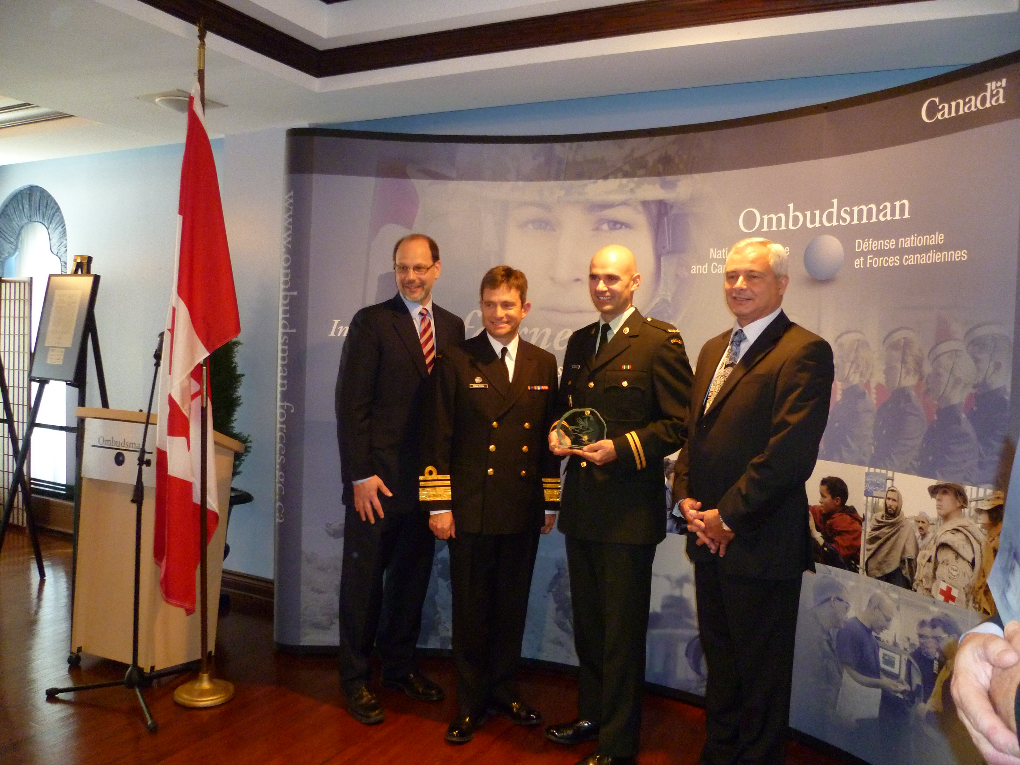 M. Howard Saper, président du comité consultatif de l'ombudsman, le vice-amiral Bruce Donaldson, vice-chef d'État-major de la Défense, Dave Blackburn et l'ombudsman des Forces canadiennes et de la Défense nationale, M. Pierre Daigle en octobre 2010.